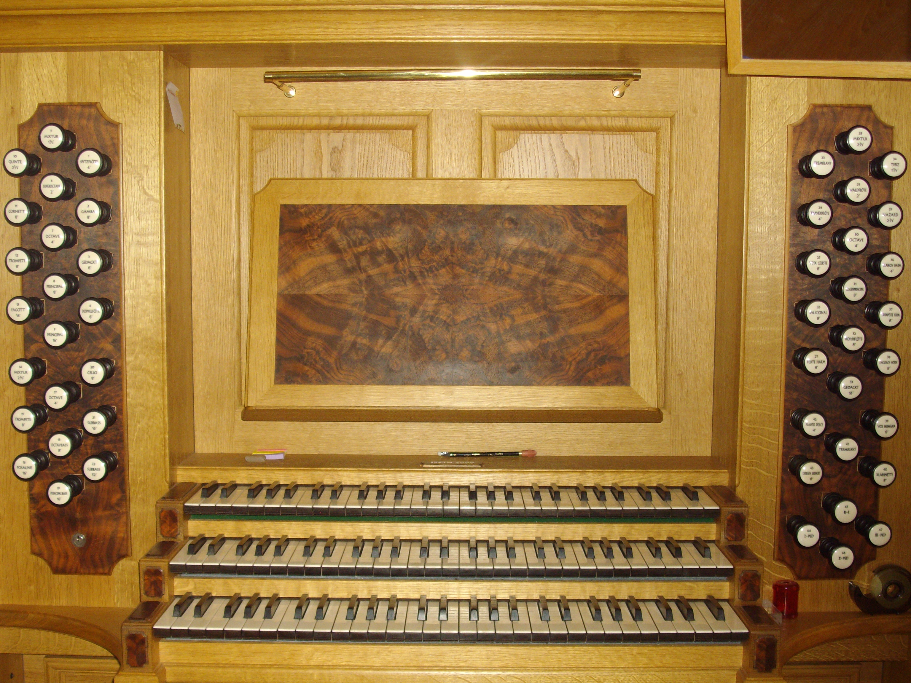 Reformierten Kirche Wädenswil (1764-1767), Spieltisch der Orgel